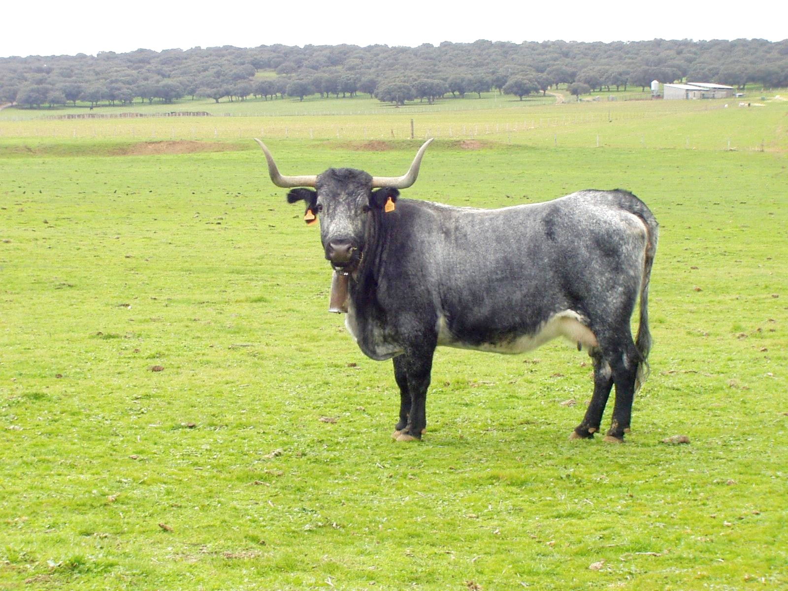 Vaca morucha. Villalba de los Llanos. Salamanca. Campo Charro